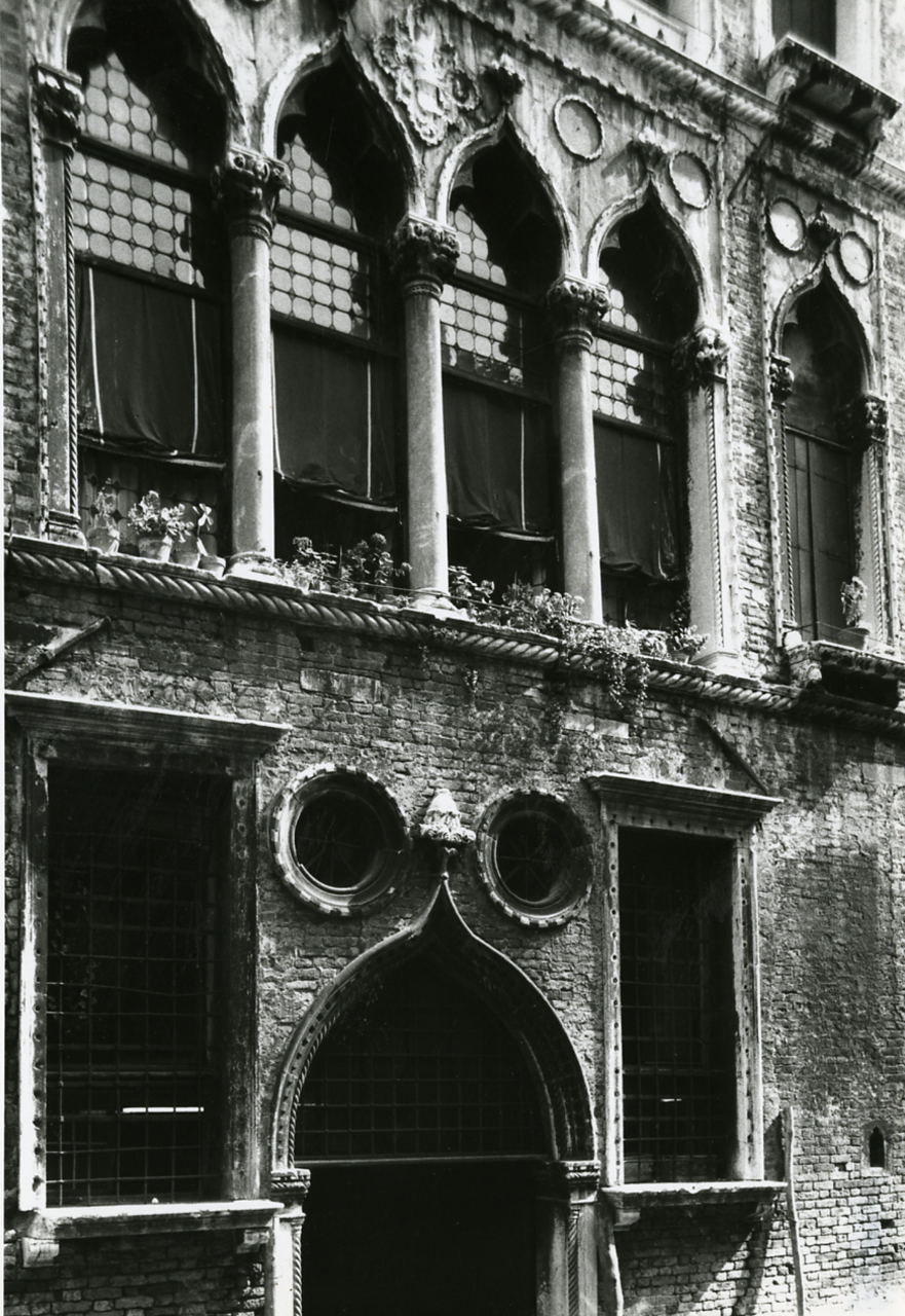 Servizio fotografico : Venezia, 1969 / Paolo Monti. - Stampe: 13 : Positivo b/n, gelatina bromuro d'argento/ carta, 18x24. - ((Al verso delle stampe manoscritti i numeri dei negativi corrispondenti (formato 35 mm) con indicazione del fotogramma: 828/14, 828/19, 875/19, 875/21, 878/37, 878/47, 880/24, 880/52, 880/56, 882/3, 882/5, 889/17, 891/18; iscrizioni didascaliche manoscritte a matita; timbro a inchiostro con copyright (Via Tasso - Milano). - Sul coperchio della scatola iscrizione didascalica manoscritta a pennarello nero: "Venezia gotica". - Occasione: Documentazione per la pubblicazione: Arslan Edoardo, "Venezia gotica: architettura civile gotica veneziana", Milano, Electa, 1970. - Fonte: Monografia di Arslan, Edoardo: Venezia gotica: architettura civile gotica veneziana, Milano, Electa (1970)